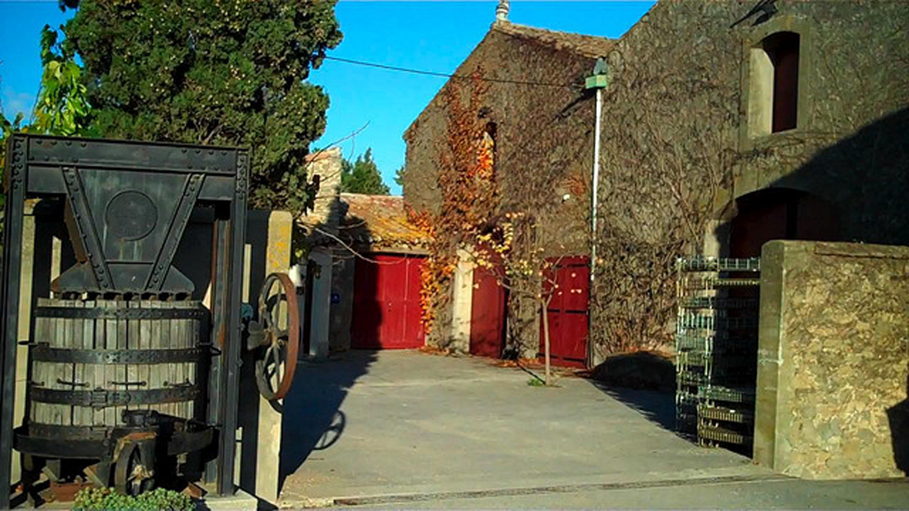 Domaine des Homs en AOC Minervois